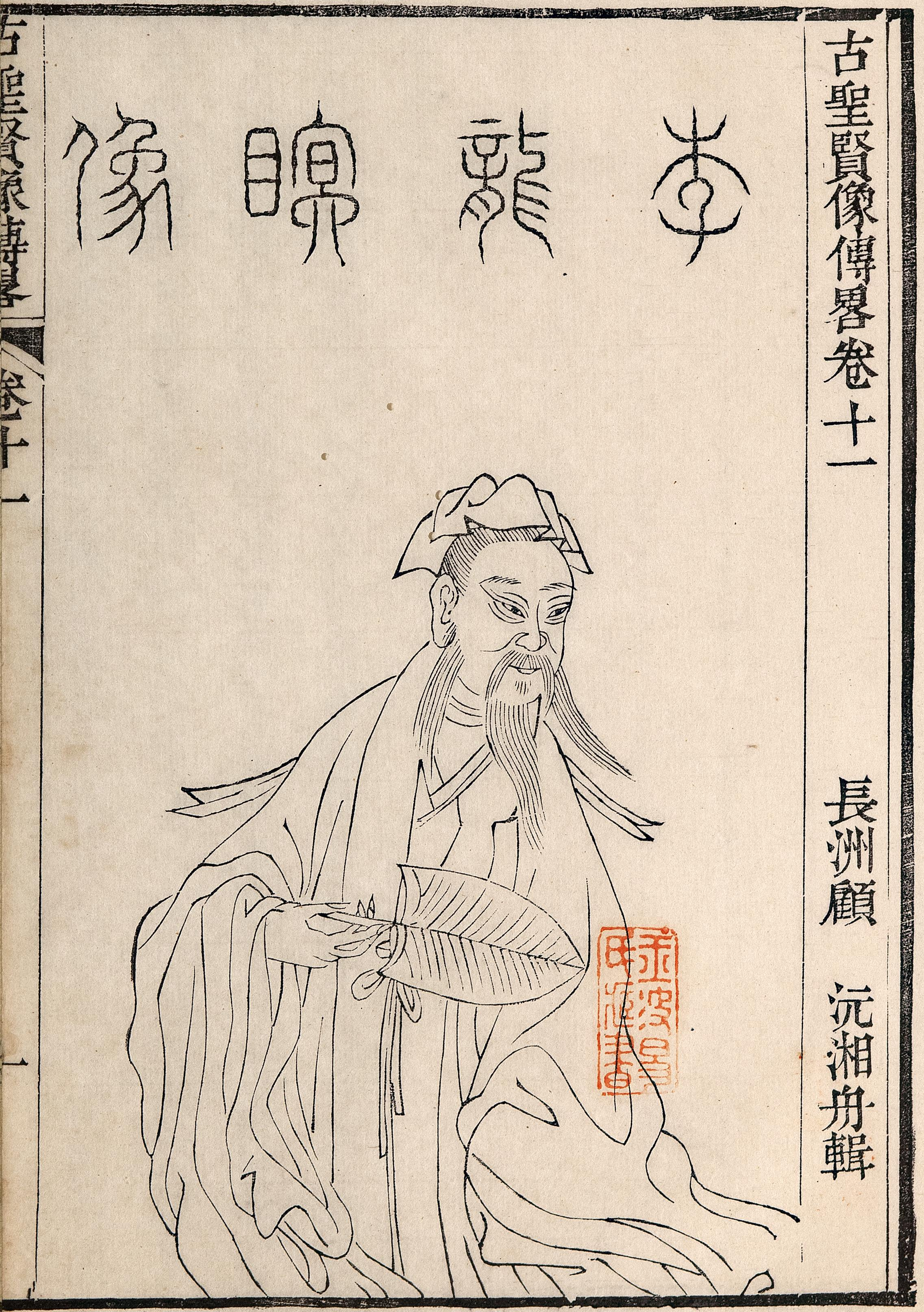 李公麟取自清顾沅辑，道光十年刻本《古圣贤像传略》